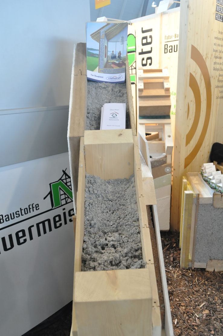 Messe HAUS HOLZ ENERGIE 2012 in Stuttgart Dieses Foto entstand durch Unterstützung des gemeinnützigen Vereins Skillshare.eu Skillshare e.V. ist ein eingetragener gemeinnütziger Verein zur Förderung der Bildung durch Unterstützung der Erstellung, Sammlung und Verbreitung so genannten freien Wissens. IBAN: DE16 8306 5408 0004 8850 66 BIC: GENODEF1SLR Bank: VR-Bank Altenburger Land